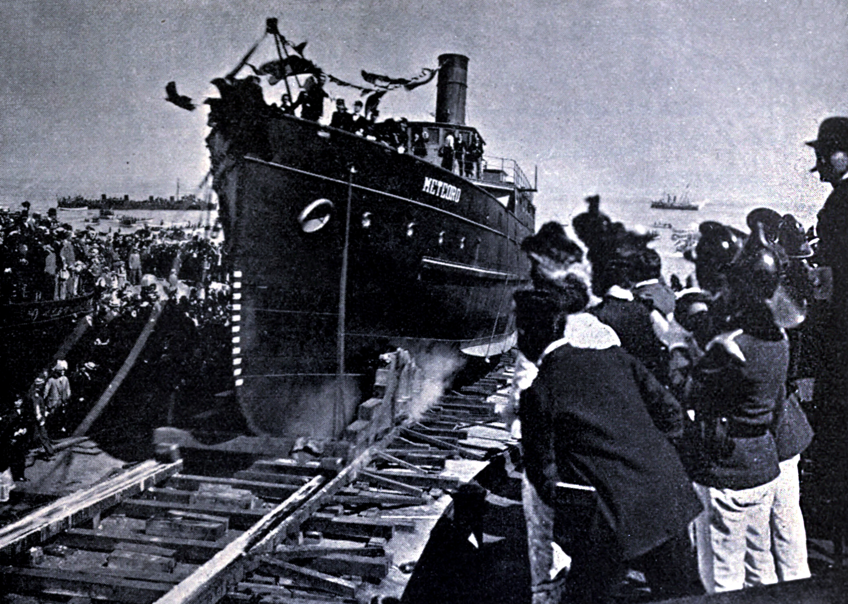 Botadura de la escampavía Meteoro en los astilleros de Miramar, de Lever, Murphy & Co. 1901.